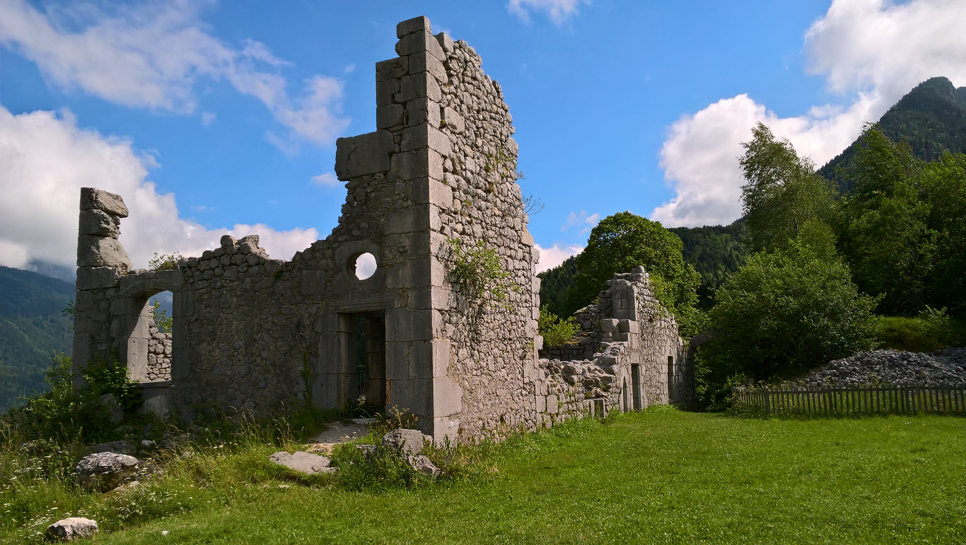 Saint-Pierre-d'Entremont, nouveau château de Montbel (Isère) ou château du Gouverneur, vu du nord.